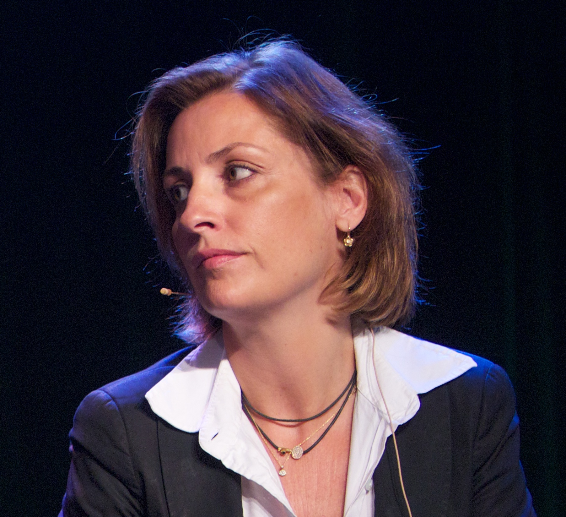 Bergen, 20110513. Nordiske Mediedager, fredag. Adam Price , Camilla Hammerich. Foto: Eirik Helland Urke